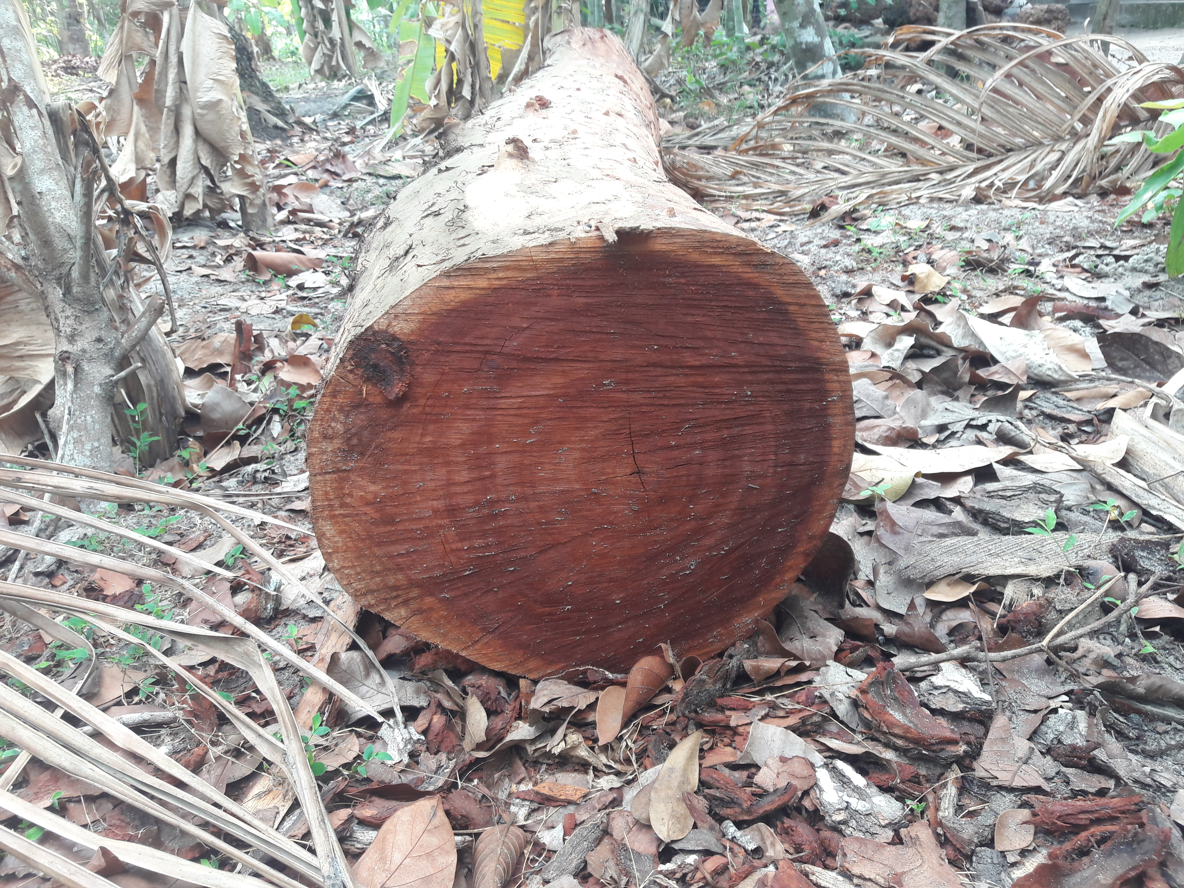 വിളവെടുപ്പ് കഴിഞ്ഞ ഒരു മഹാഗണി. Mahogany tree ശാസ്ത്രീയ നാമം Swietenia macrophylla കുടുംബം Meliaceae.